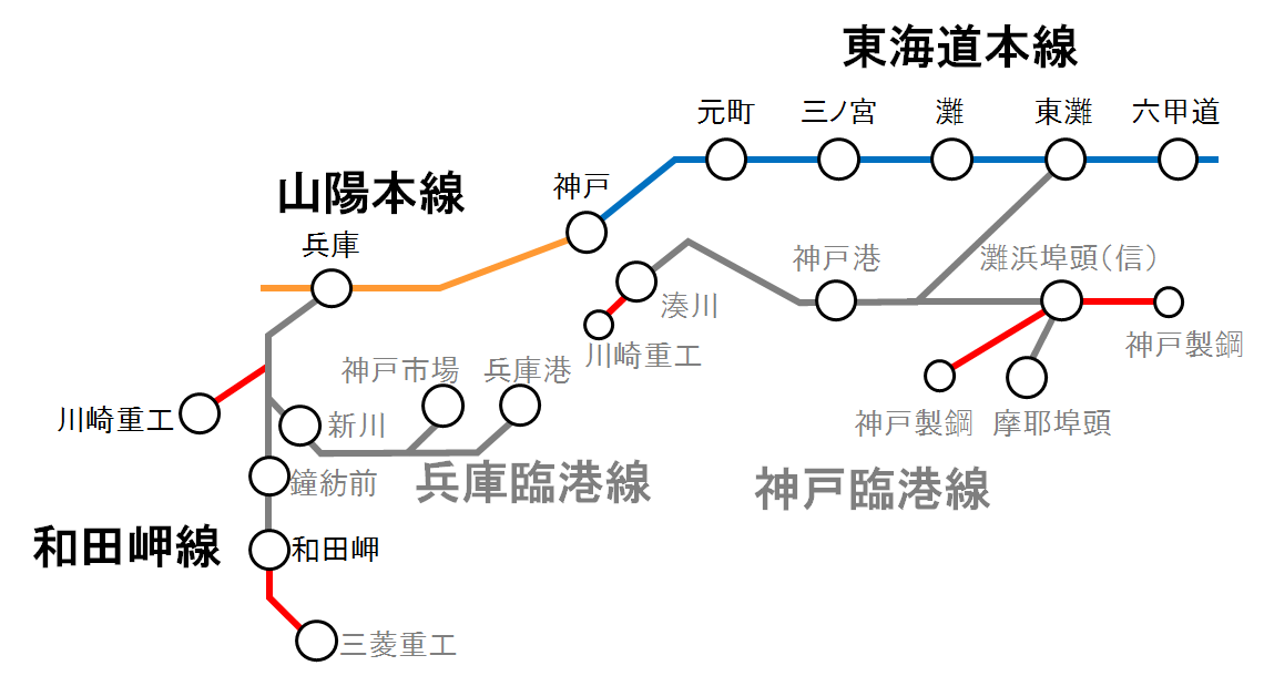 神戸臨港線と和田岬線の概略、より細かい専用線群は省略している。